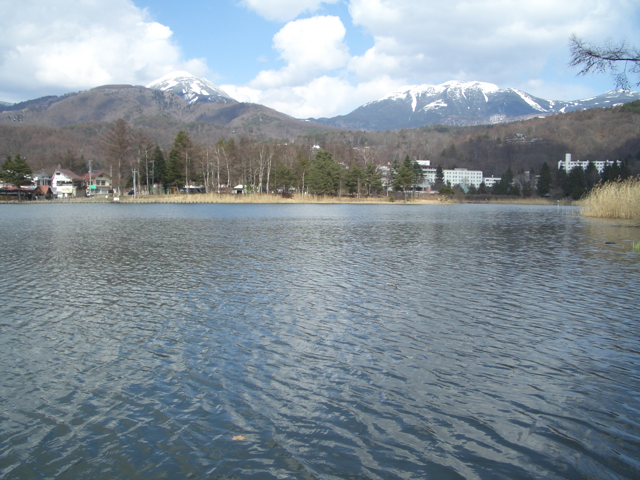 Lake Tateshina (蓼科湖)